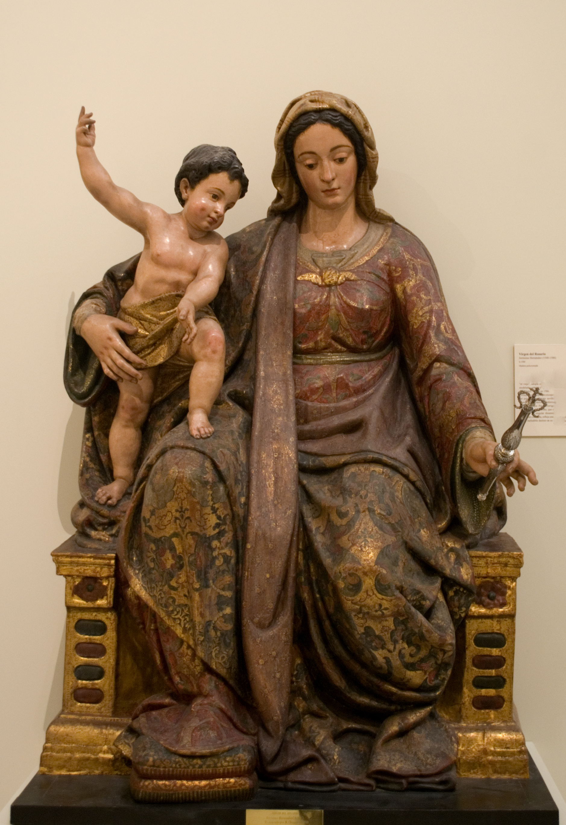 Virgen del Rosario (hacia 1580), madera policromada, autor: Jerónimo Hernández Capilla del Museo de Sevilla, temporalmente expuesta en el Museo de Bellas Artes de Sevilla. Museum of Fine Arts of Seville (Inventory)Native nameMuseo de Bellas Artes de SevillaLocationSeville, (Spain)Coordinates37° 23′ 33″ N, 5° 59′ 59″ W Established1835Web pageMuseo de Bellas Artes de SevillaAuthority control : Q2163496 VIAF: 134827096 ULAN: 500308942 LCCN: nr98029689 OSM: 6252947 BIC: RI-51-0001116 WorldCat institution QS:P195,Q2163496